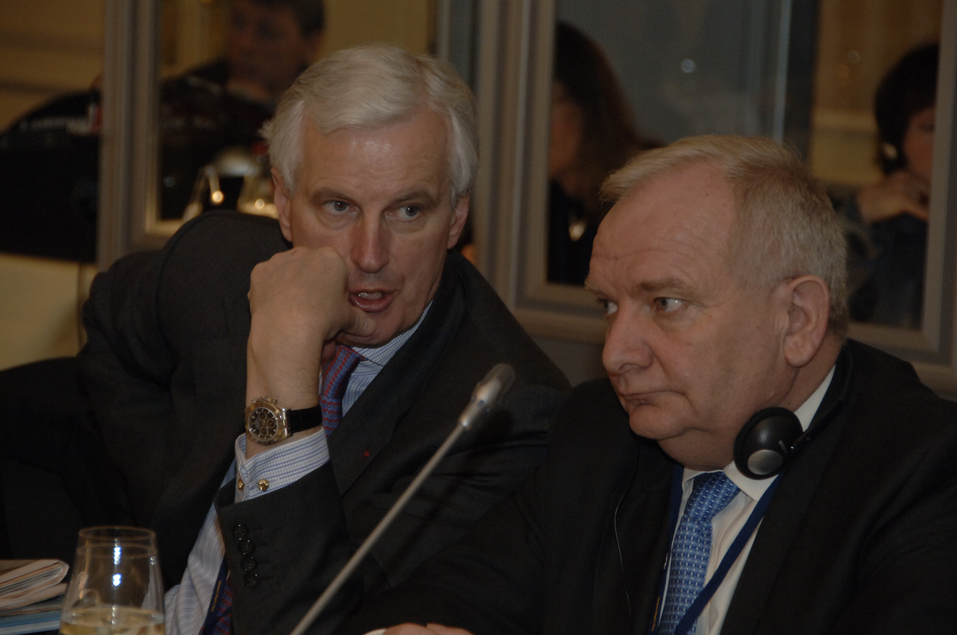 Barnier-Daul2